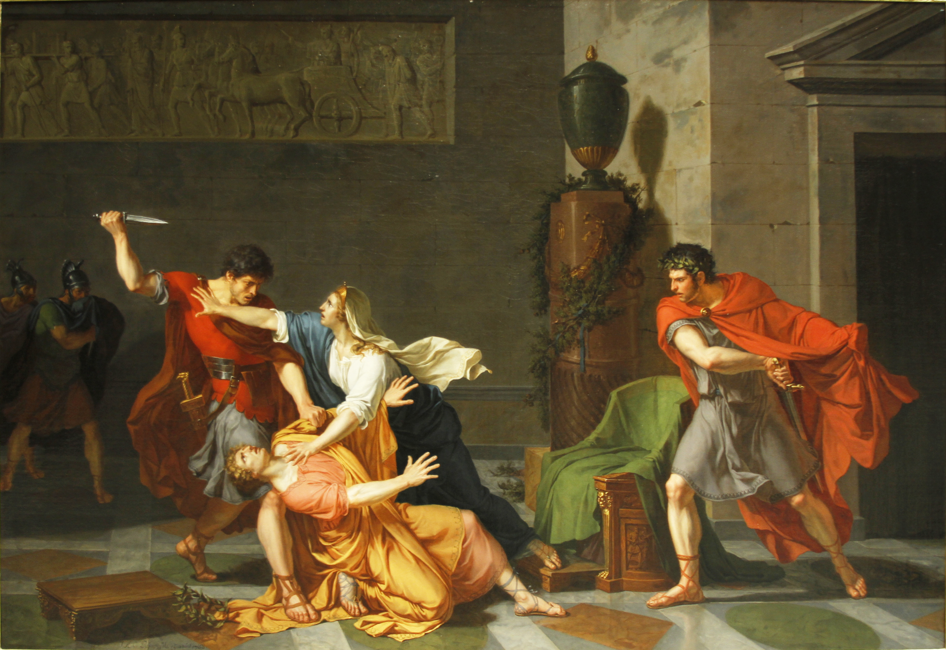 Staatsgalerie - Stuttgart - Germany